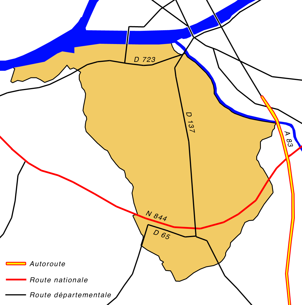 Principaux réseaux routiers de Rezé, France.